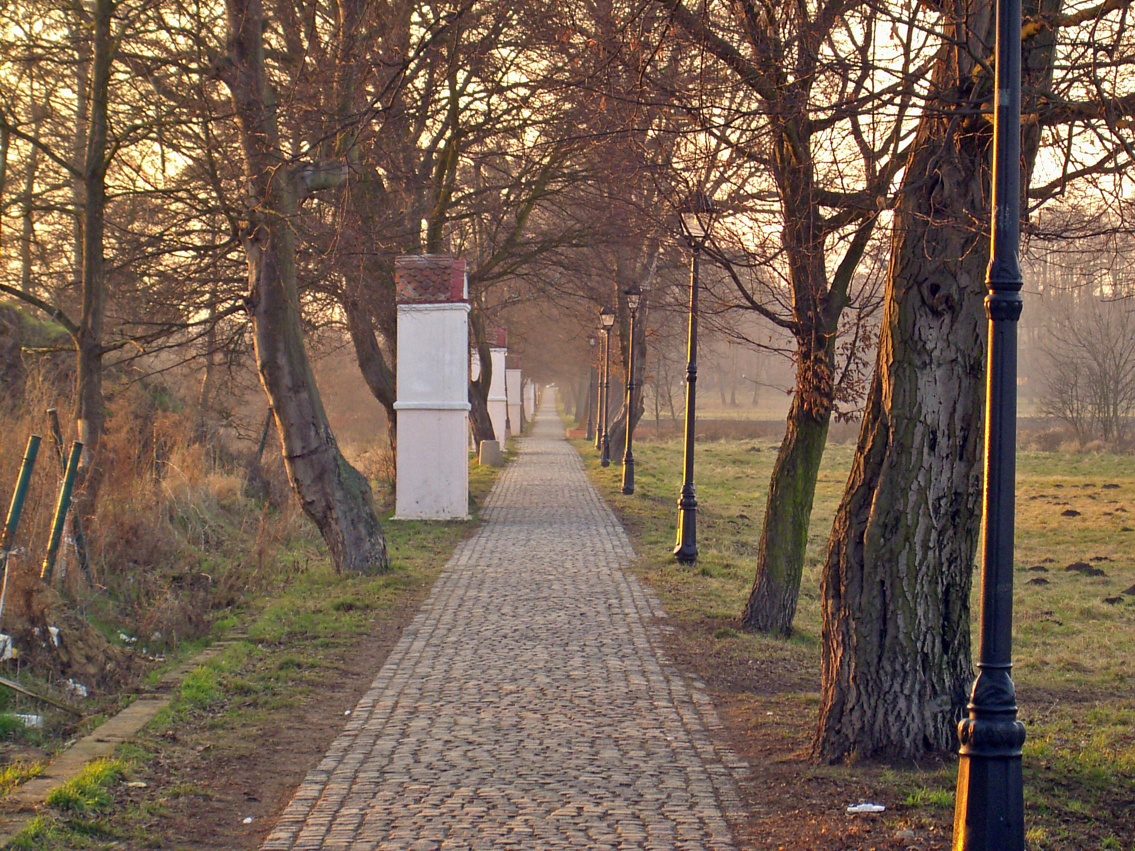 Alejka krzyżowa łącząca Stare Miasto z Warzyniem, Brzeg Dolny